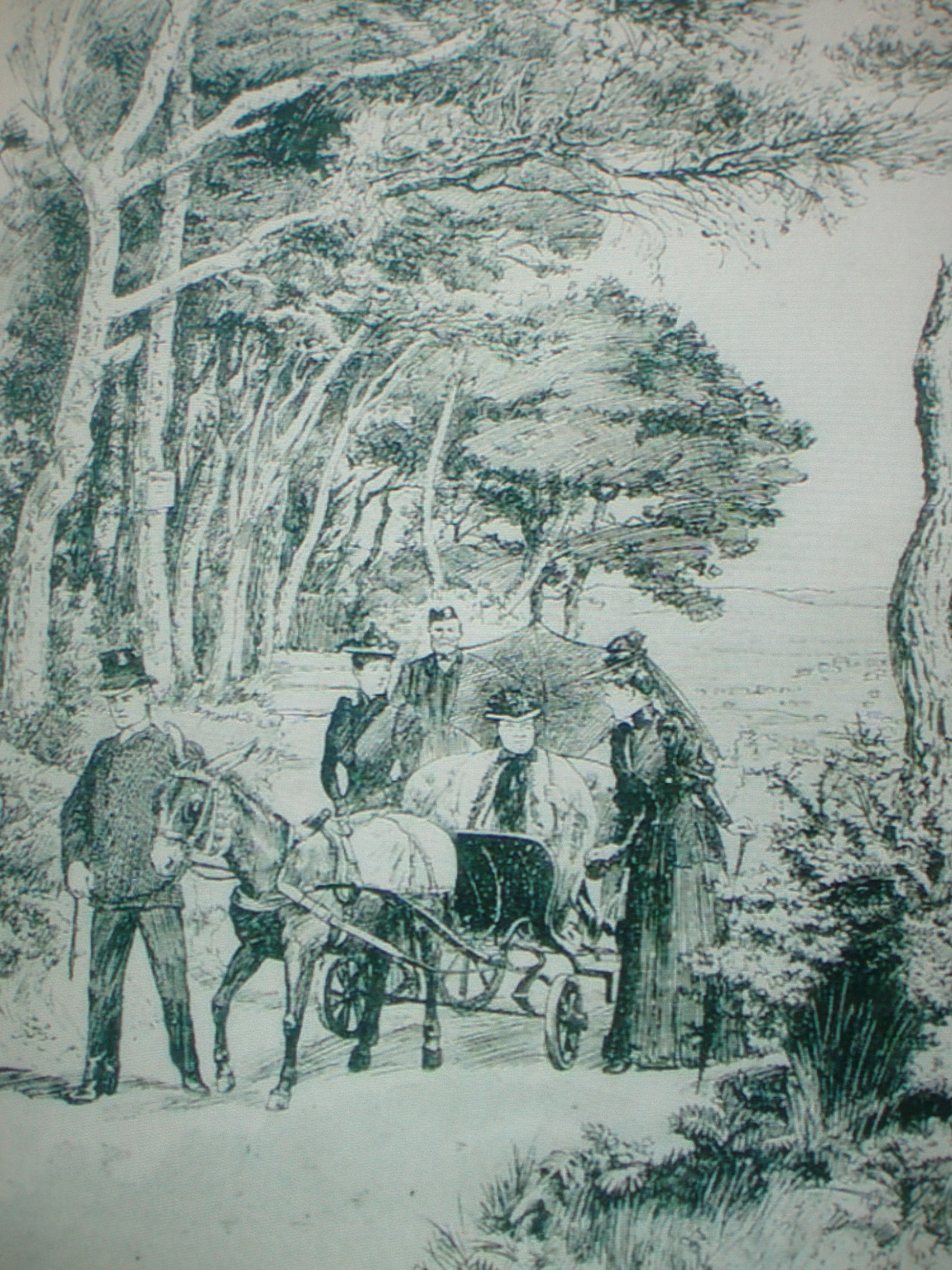 La Reine Victoria arrivant au Plantier chez ses amis les Bouëxic de Guichen, Hyères, 1892.